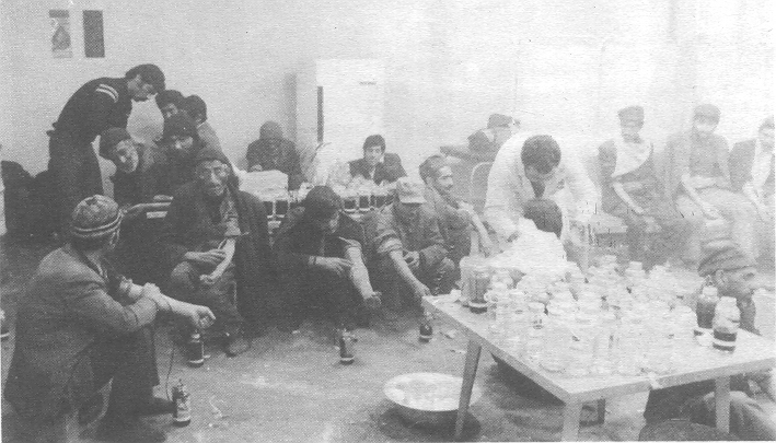 "dayerh mina" (Film), 1973.